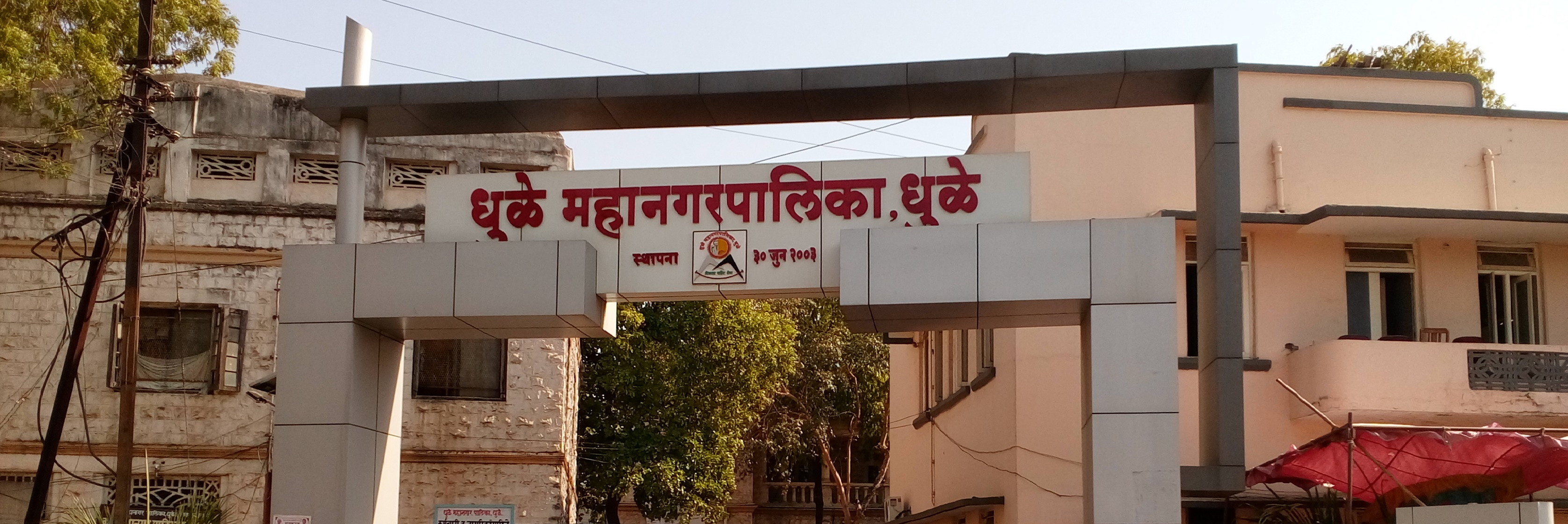 धुळे महानगरपालिका